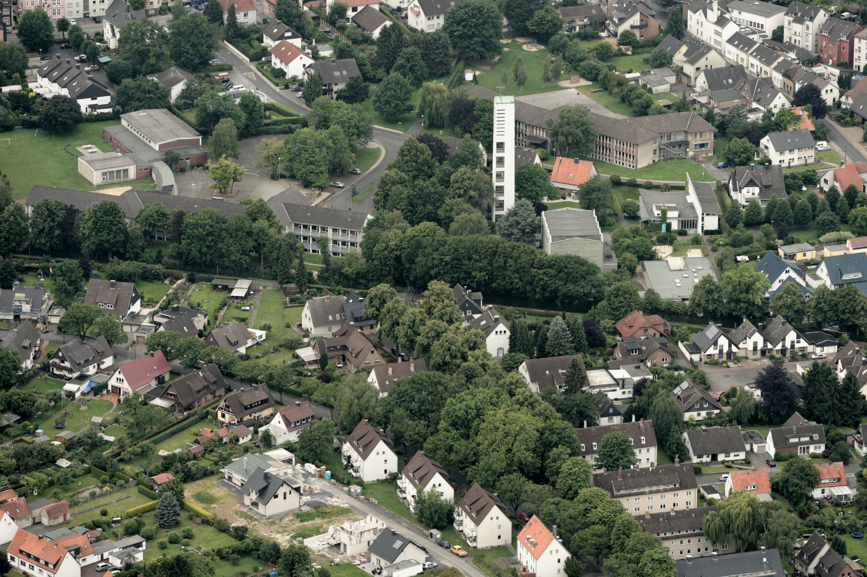 Werl: Evangelische Paulus-Kirche und Paul-Gerhardt-Grundschule. Fotoflug Sauerland Nord. The making of this document was supported by the Community-Budget of Wikimedia Germany.